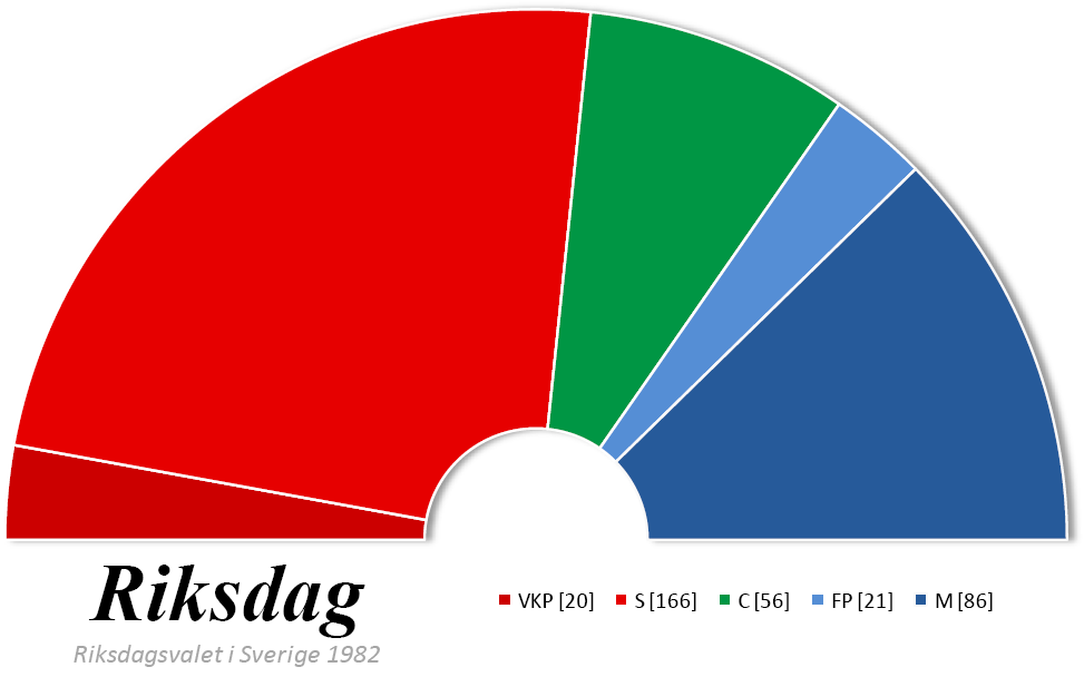 Composition du Riksdag suédois après les élections générales de 1982